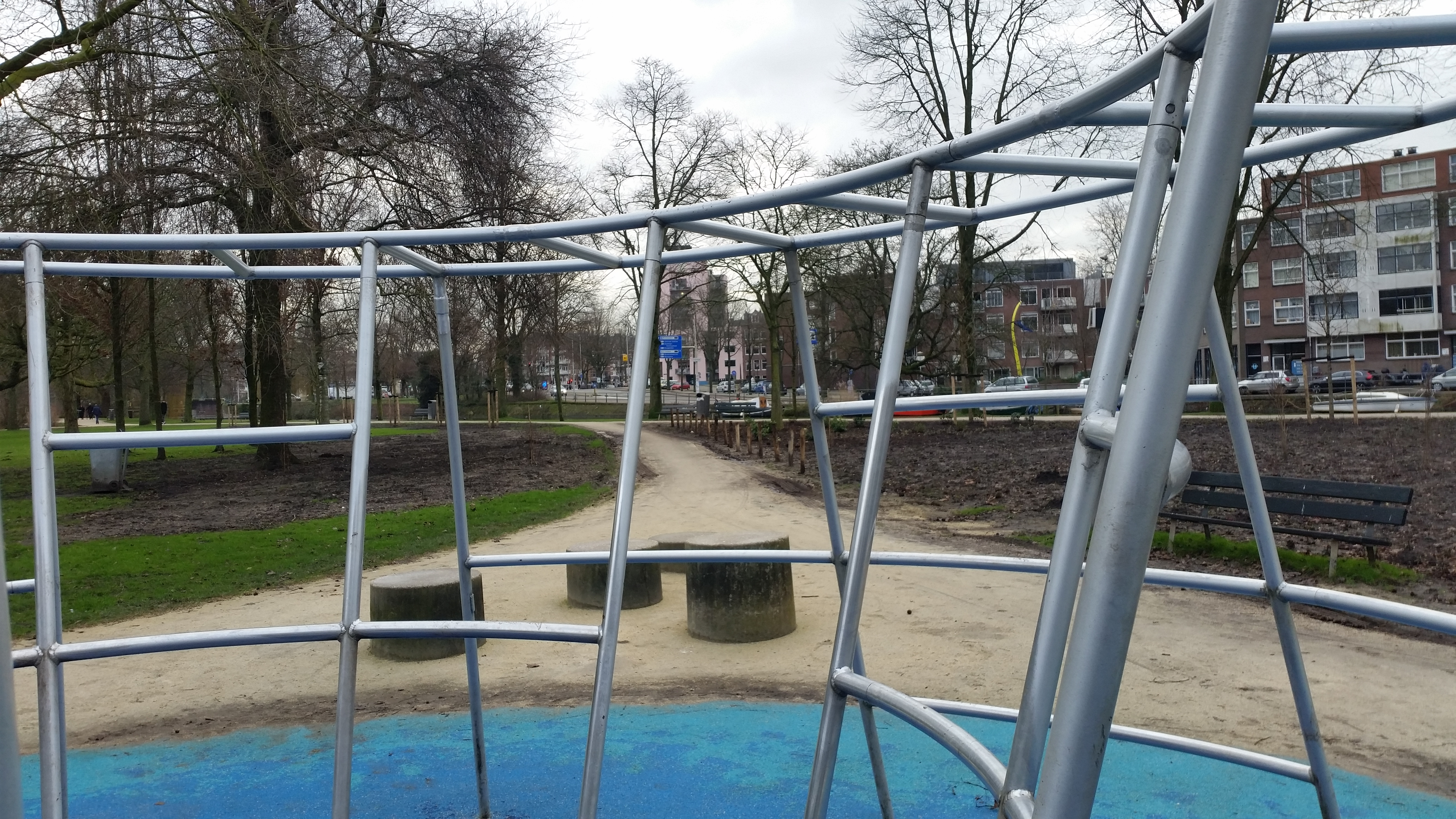 Fotoserie van het klimrek van Aldo van Eyck in het Westerpark, Amsterdam-West (januari 2020)